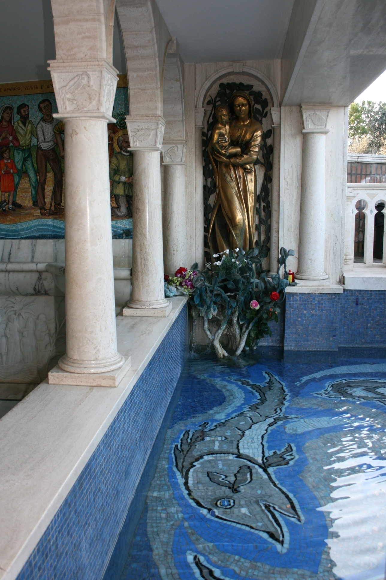 piscina per l'immersione dei fedeli invalidi e dei pellegrini nell'acqua sgorgata con l'apparizione della Vergine presso il santuario della madonna dello splendore di giulianova-te